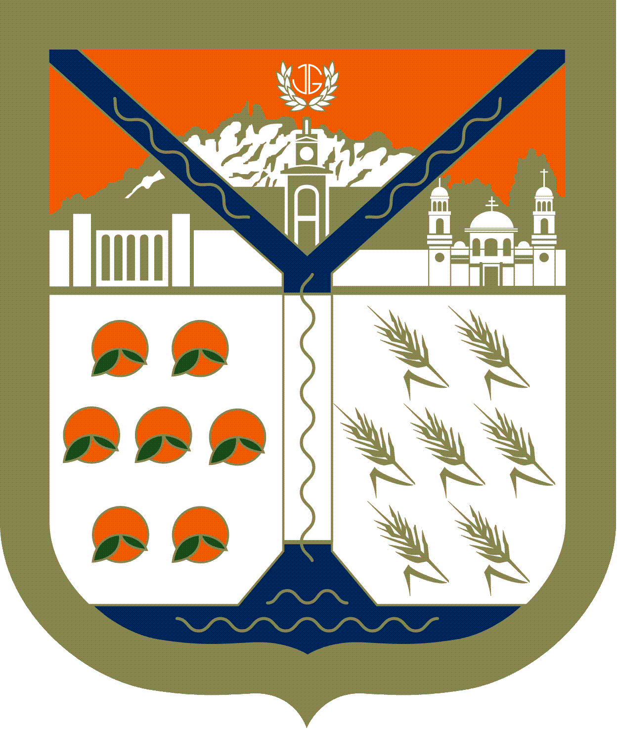 Escudo de armas de Hermosillo, Sonora, México.